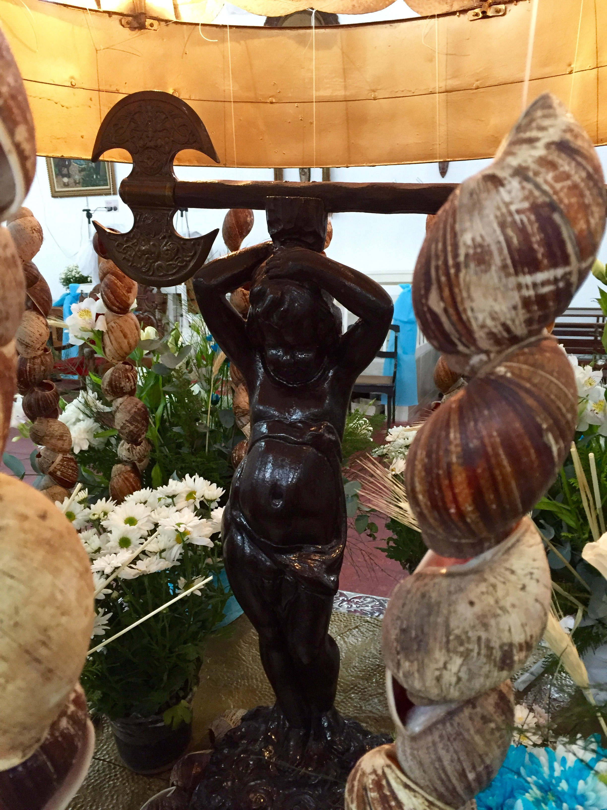 Parte interna da coroa no salão do Axé Ilê Obá, em São Paulo (SP), Brasil.